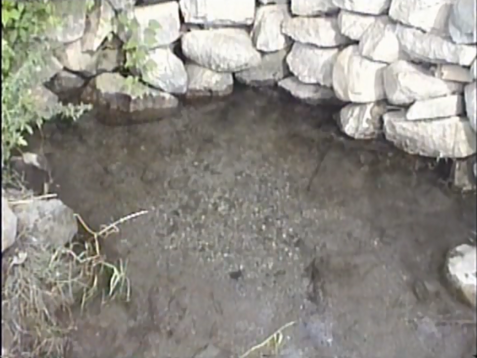 Magdalena -- Cajamarca